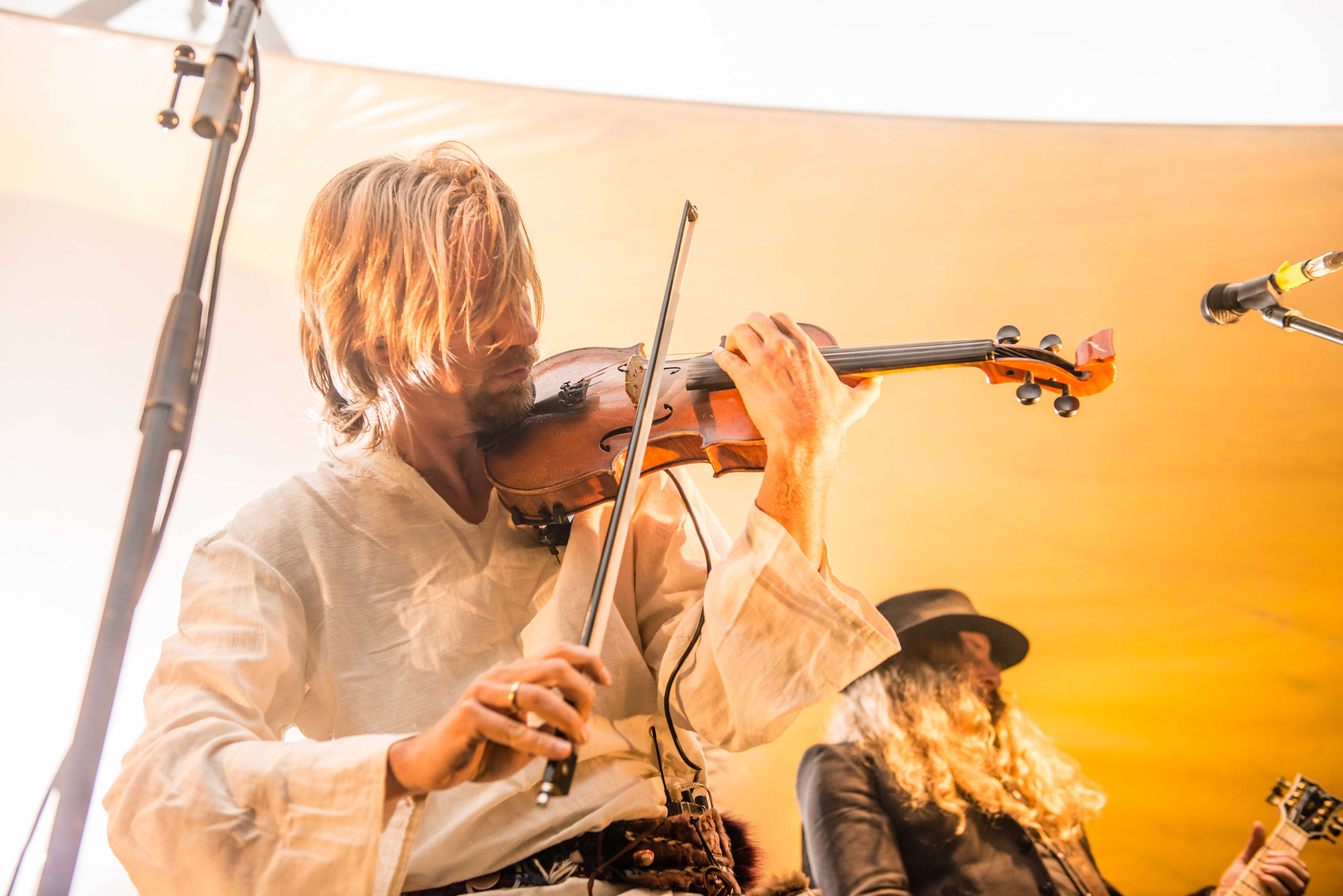 'Feuertal 2014 - Wuppertal': 'Korpiklaani'